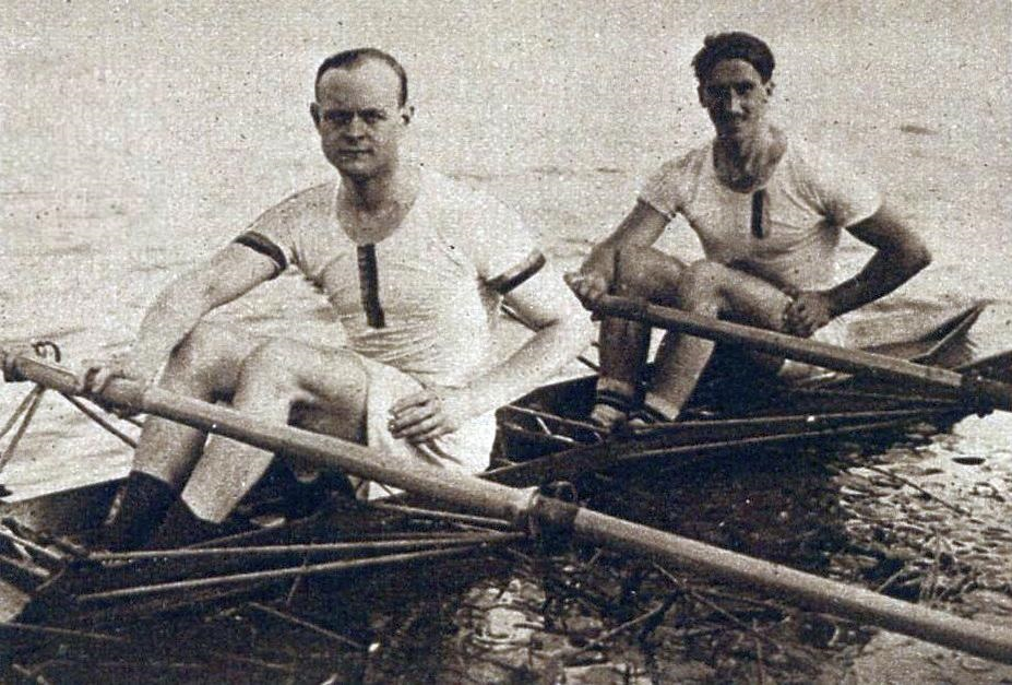 Thouvet Barrelet (devant), champion d'Europe 1913 en double-scull avec le Russe Anatole Peresselenzeff (derrière, mort durant la première guerre mondiale)